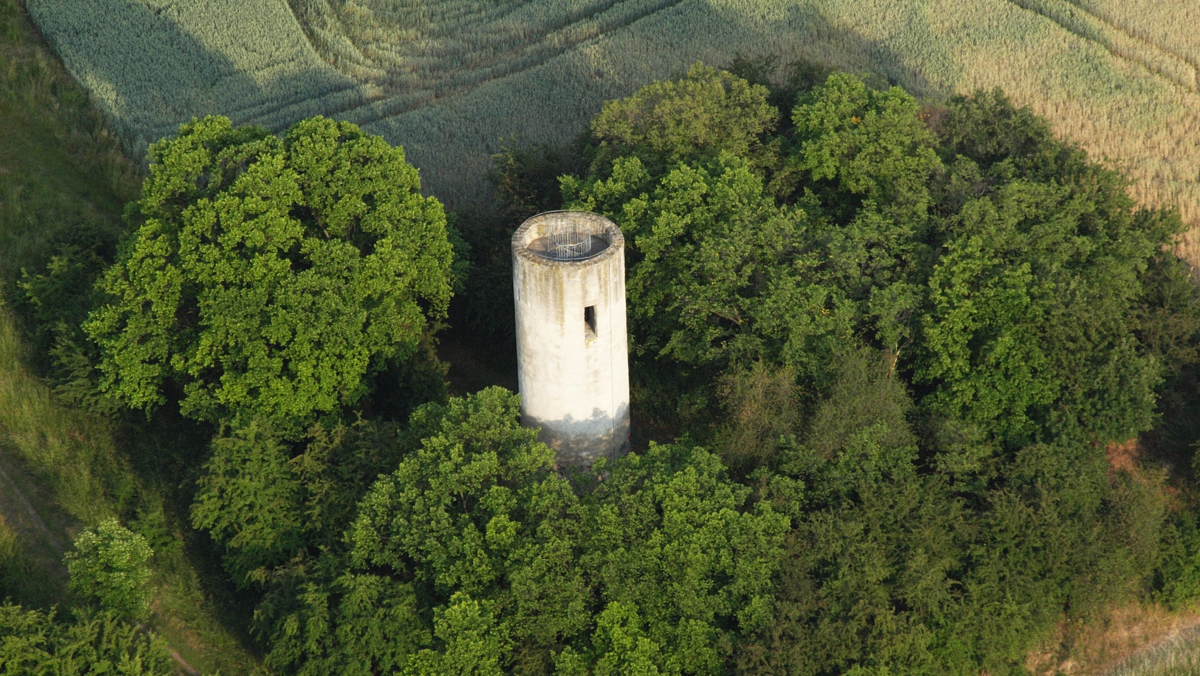 Wartturm südlich von Quedlinburg, Luftaufnahme (2015)